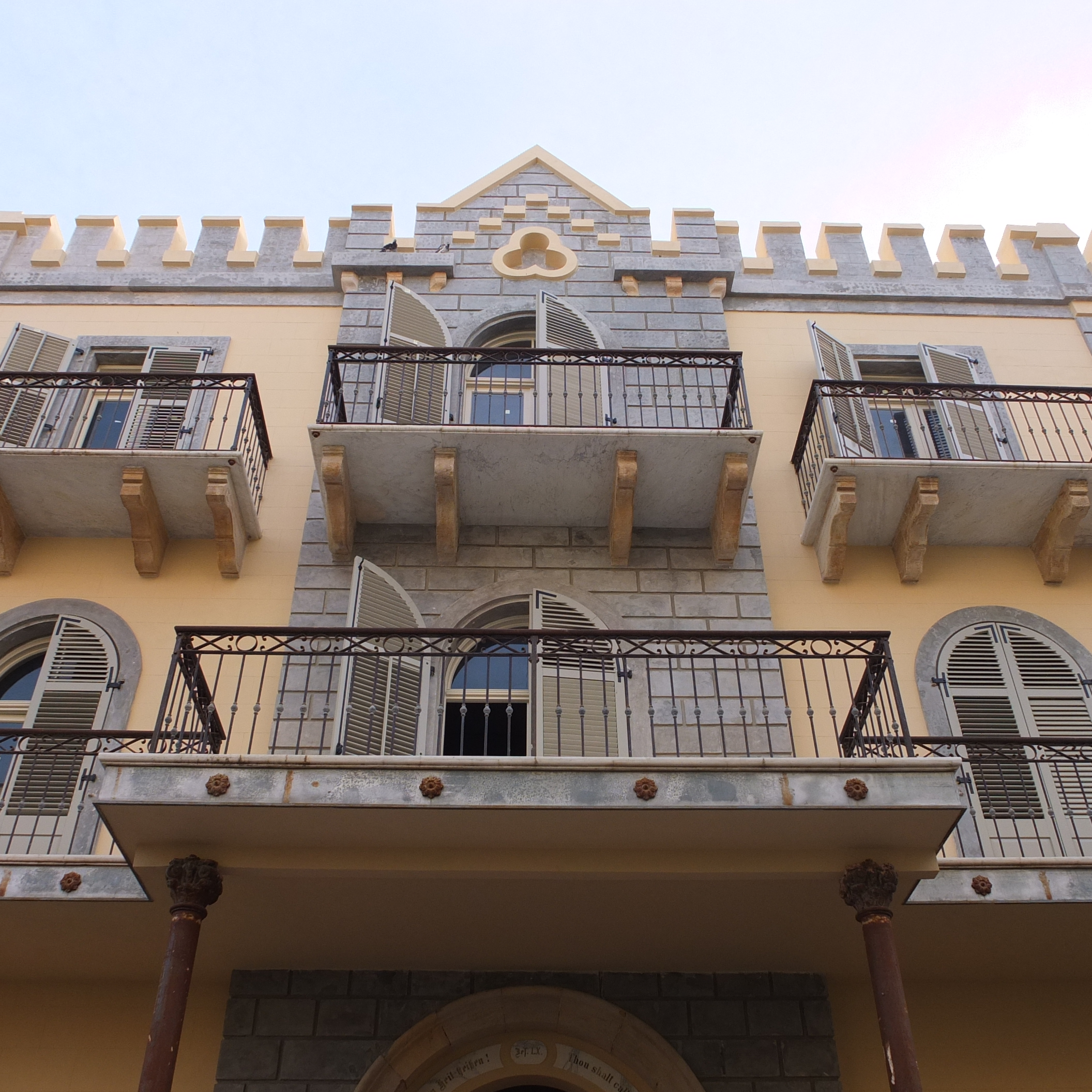 מלון פאר שהוקם בסוף המאה ב-19 במושבה הגרמנית. החדרים המפוארים במלון, שהיו מעוטרים בעיטורי סטנסיל על הקירות קיבלו שמות של נביאים ושליחים,. בשנות הארבעים עבר המלון לידיה של הבולשת הבריטית. לאחר קום המדינה שימש המבנה את משרד החינוך. לאחר שיקום בשנים האחרונות, הפך המלון לחלק ממתחם בנייה יוקרתי במושבה האמריקאית-גרמנית.